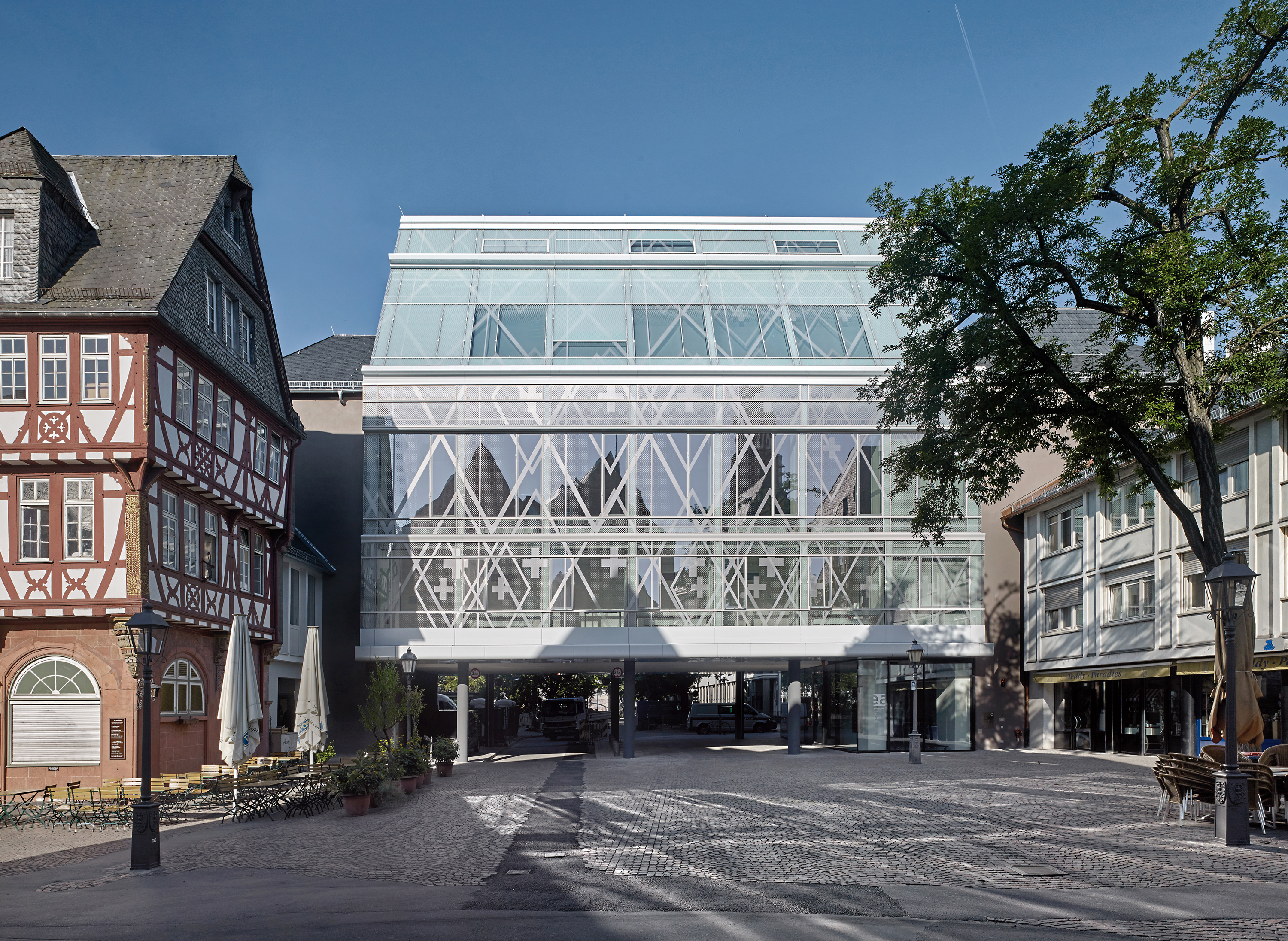 Evangelische Akademie Frankfurt Meixner Schlüter Wendt Architekten